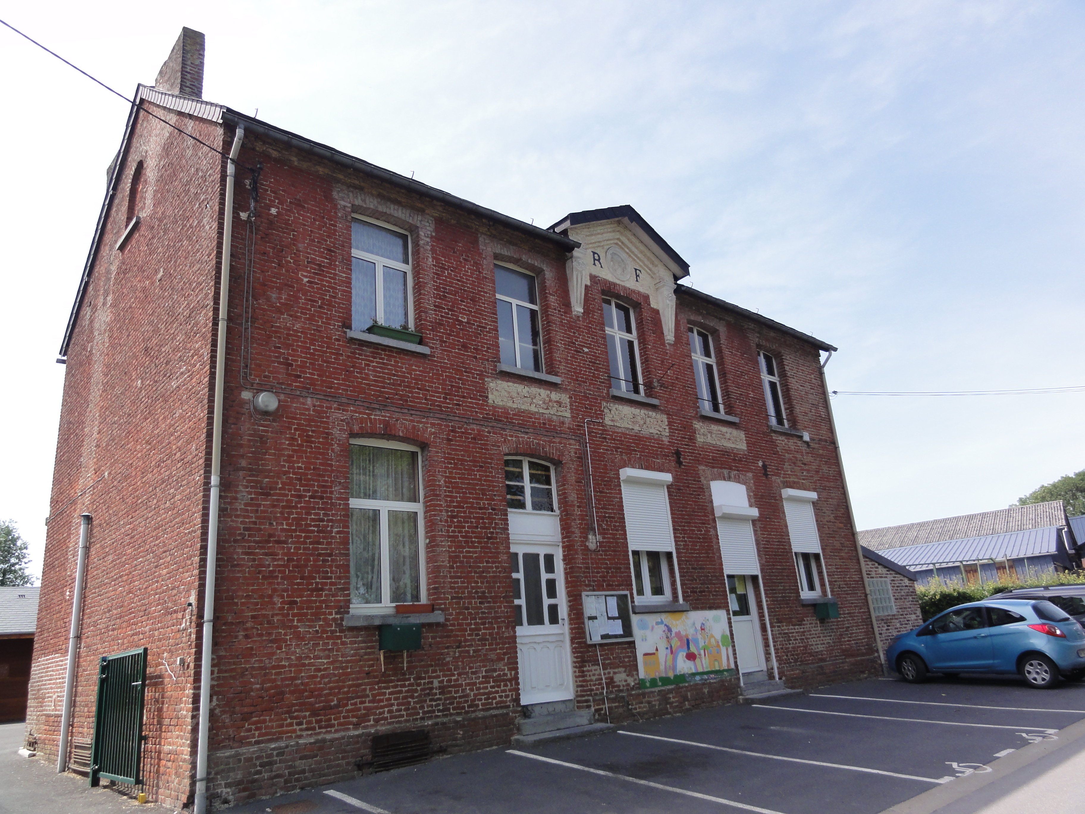 Amfroipret (Nord, Fr) école.